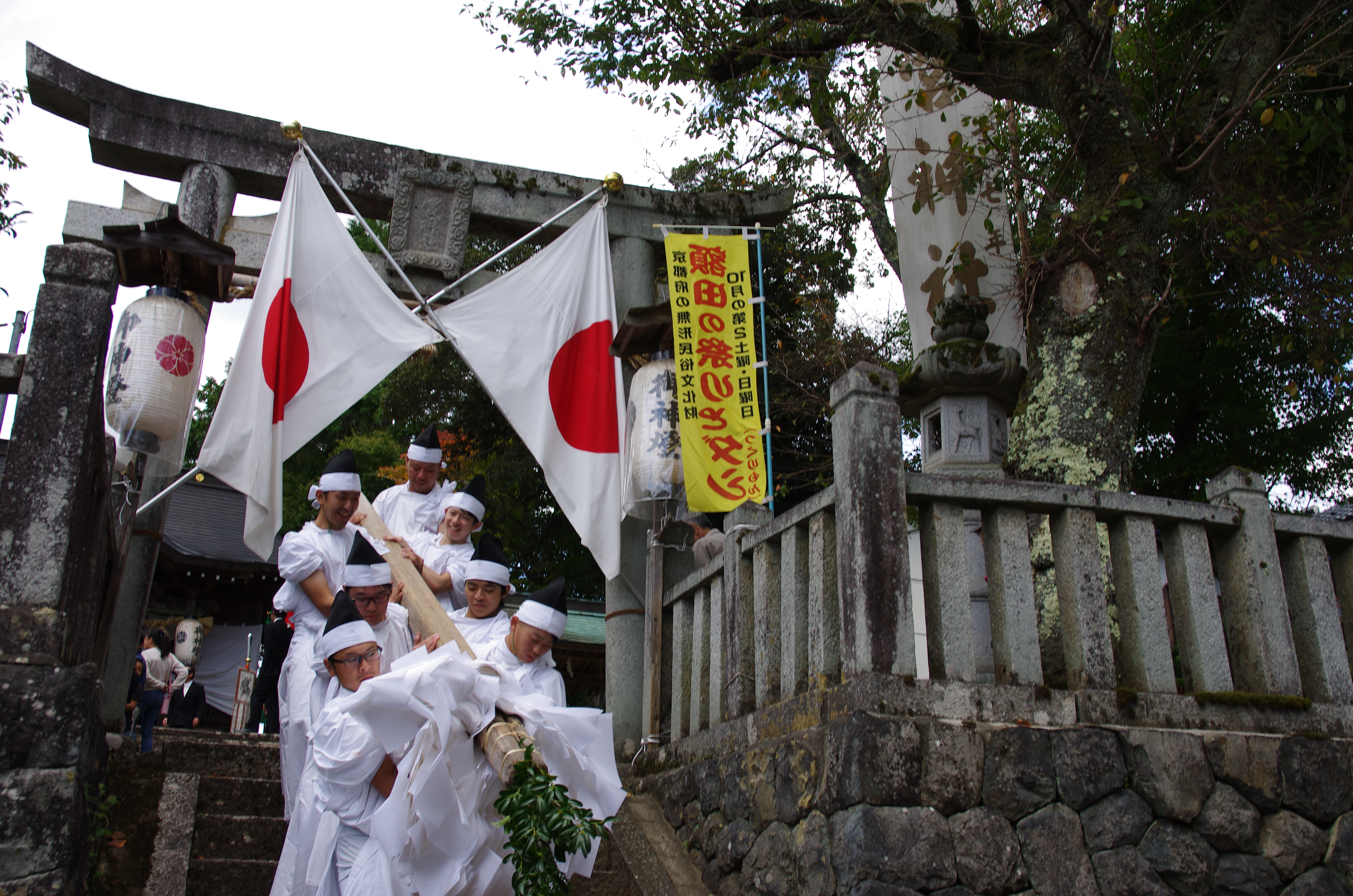 御神木だし